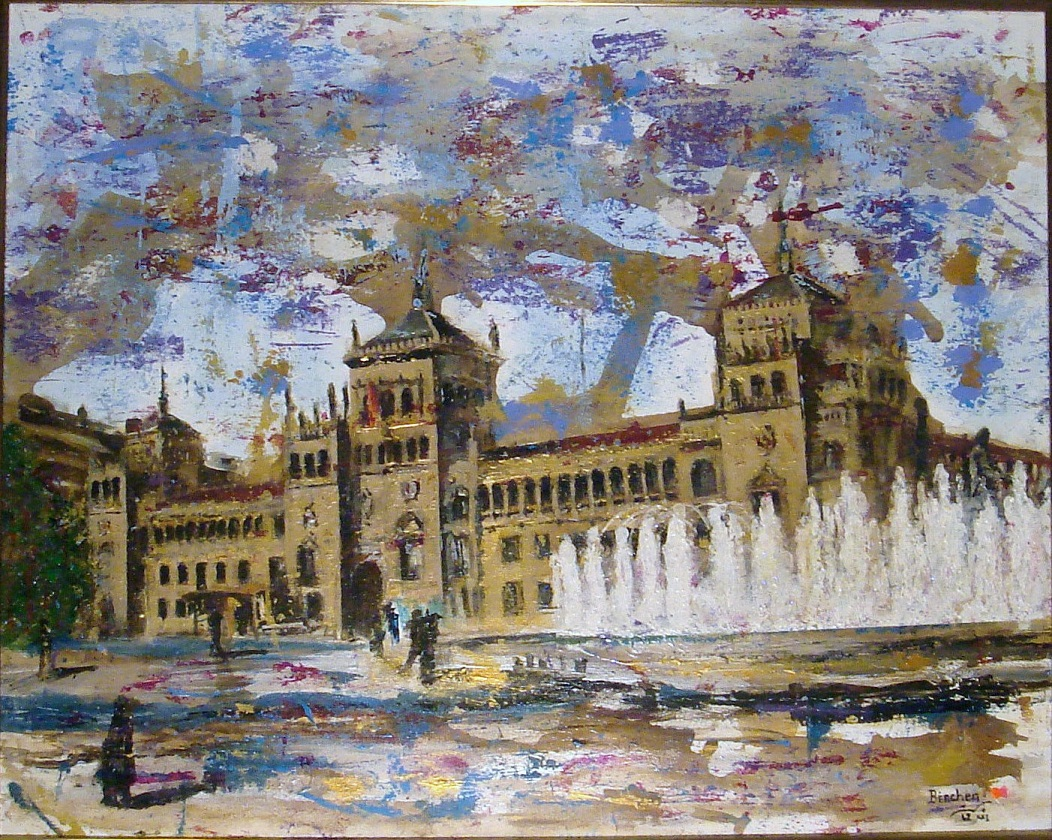 Tecnica mixta con vino